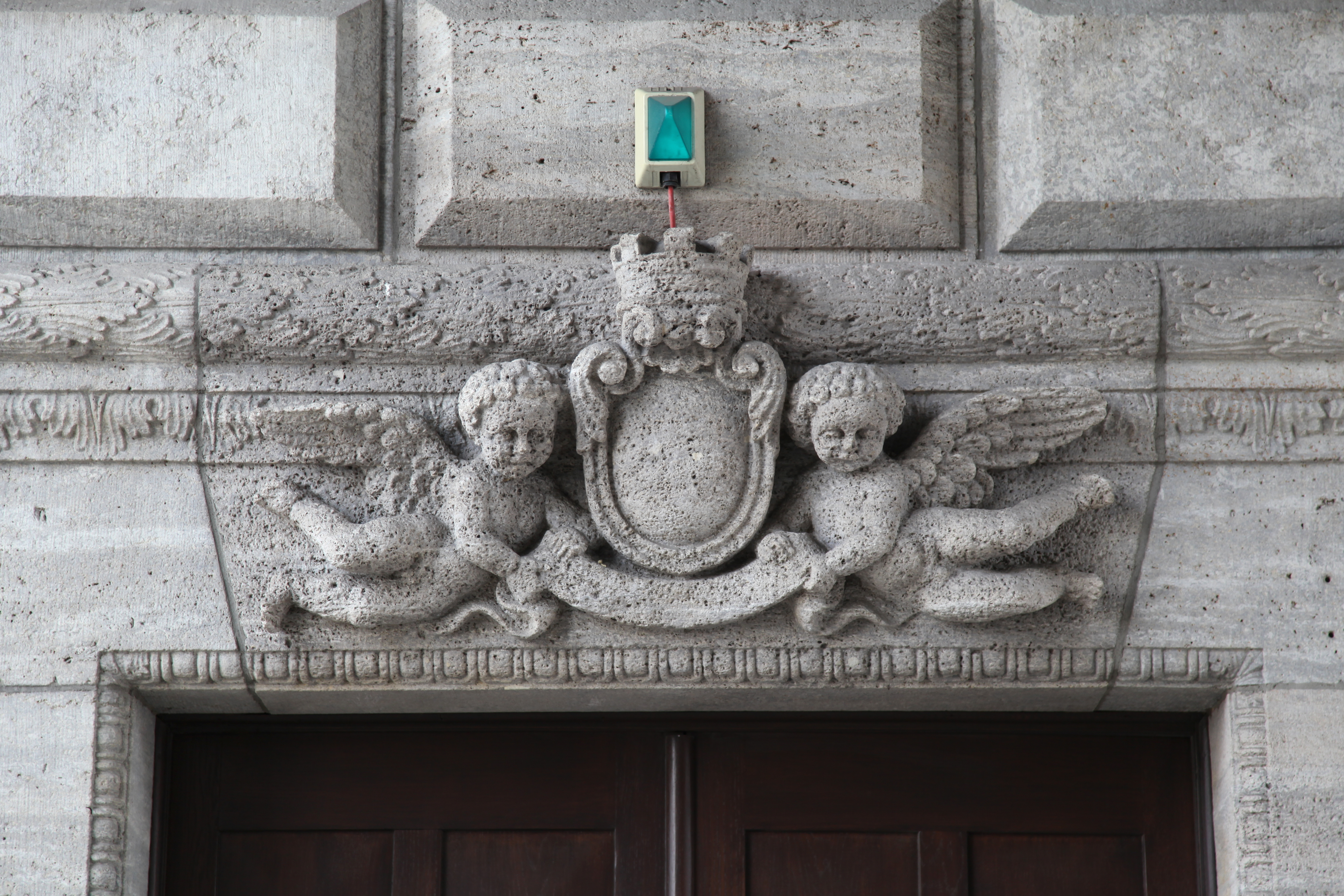 Rathaus, Friedrich-Ebert-Straße in Mülheim an der Ruhr